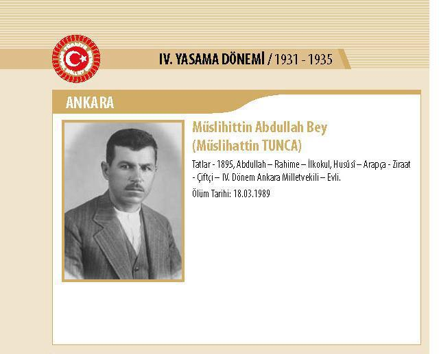 İlk Tatlar Milletvekili Müslihattin Abdullah Bey (Müslihittin Tunca)